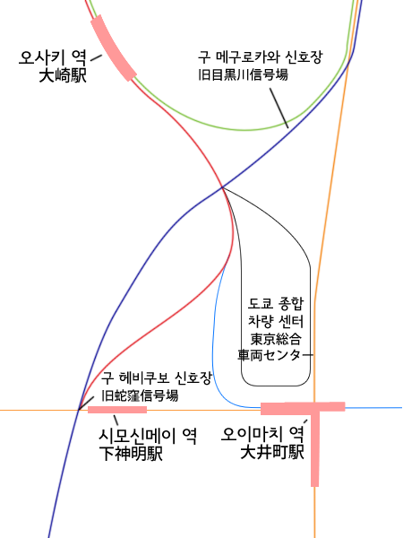 힌카쿠 선, 오사키 지선이 나뉘는 주변도를 표현한 그림. ファイル:大崎付近概略図.PNG와 지도 등을 참고하여 작성했음. Adobe Illustrator나 Sketchup이 없는 관계로 Adobe Photoshop으로 만들어서 올렸음.